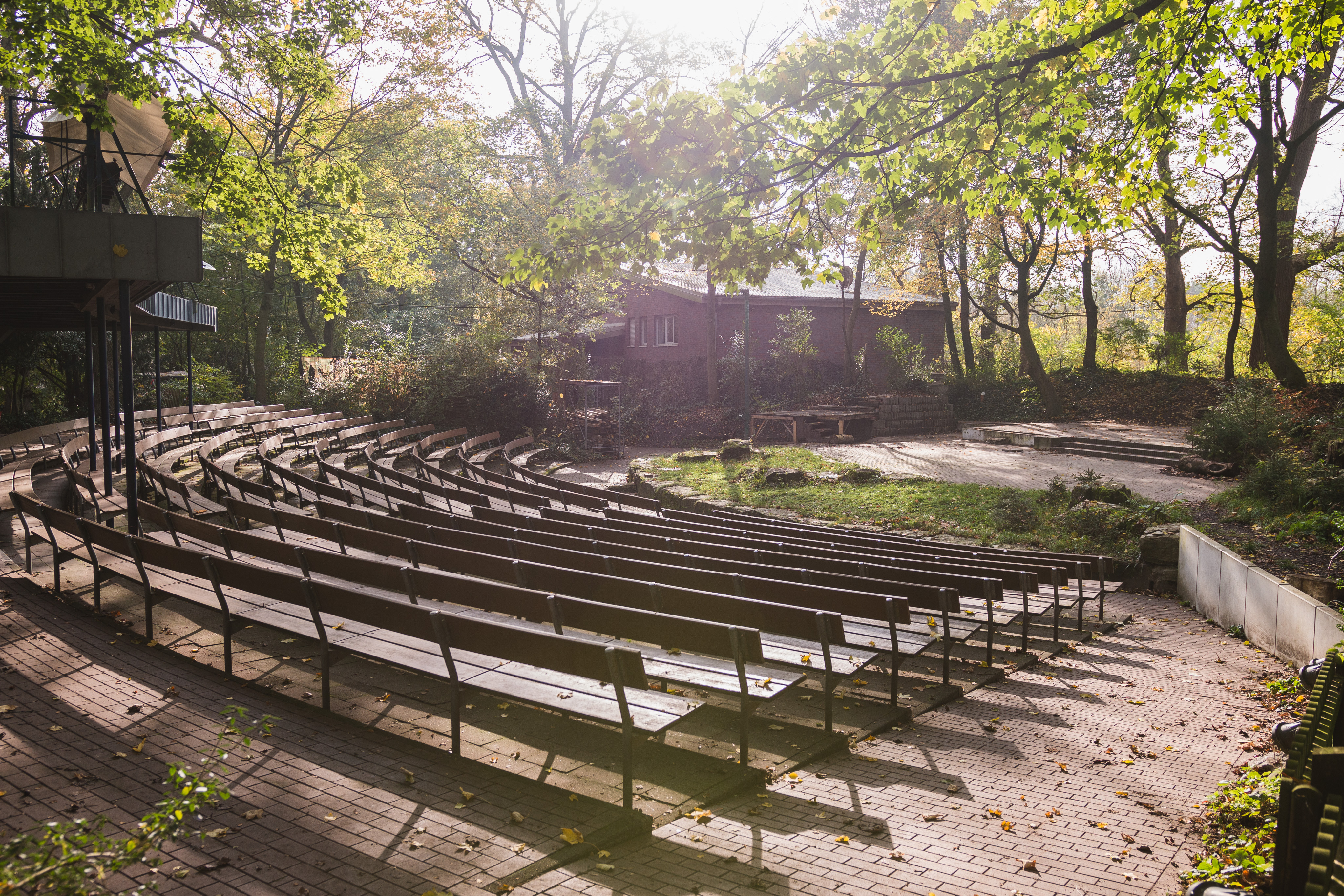 Das Foto zeigt den Zuschauerraum der Freilichtbühne Schloß Neuhaus in Paderborn mit der Bühne und dem Vereinshaus im Hinterrund.